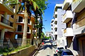 Via tipica del quartiere Caposoprano